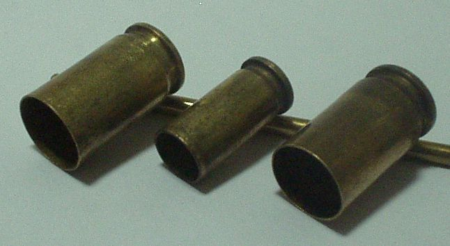 Descrição: 3 estojos. Os dois maiores são de calibre 380 e o menor é de calibre 6.35 Fonte/Créditos: Eduardo Xavier Licença